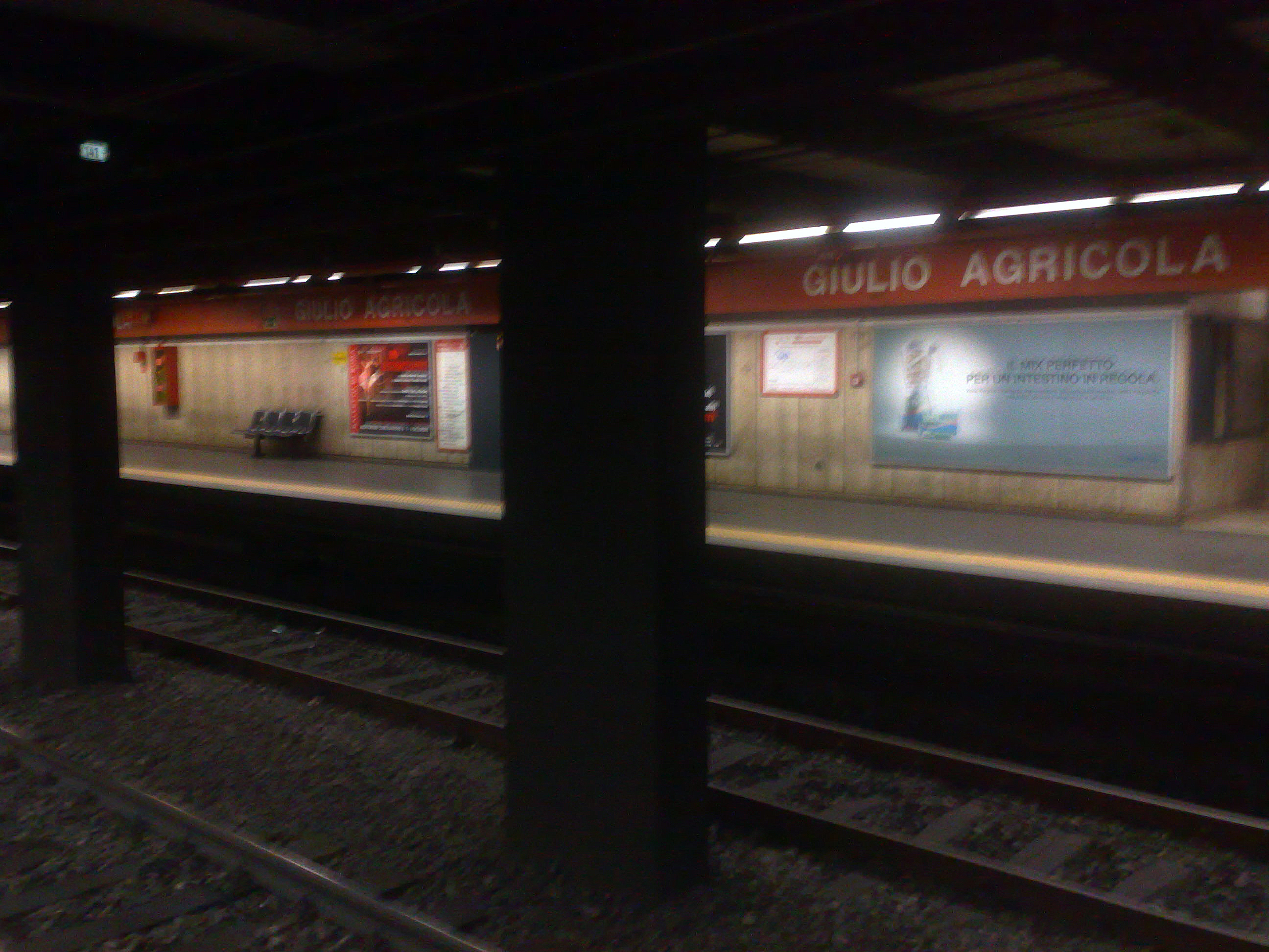 Roma, stazione metropolitana Giulio Agricola (linea A).